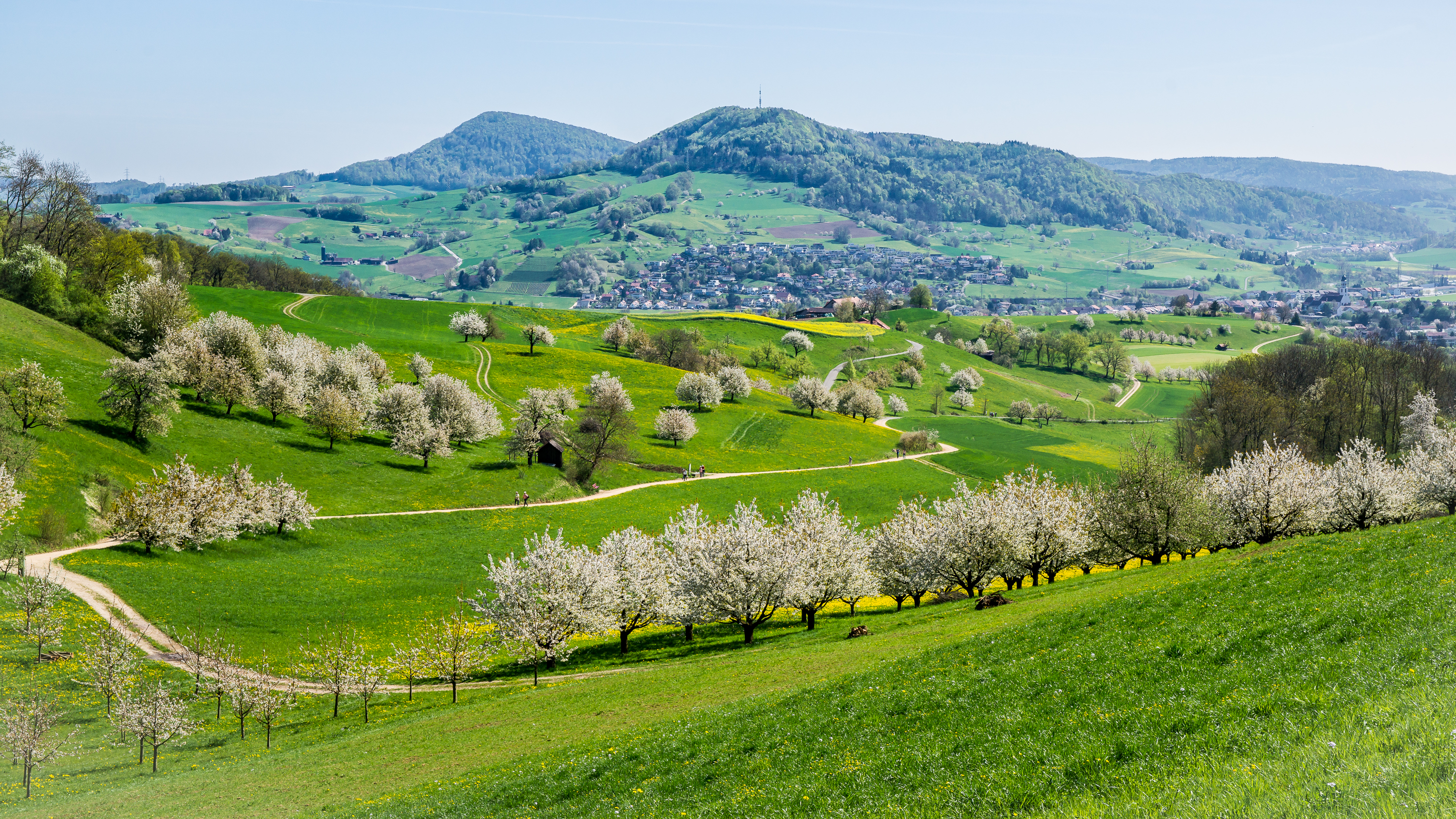 Jurapark Aargau, im Fricktal während der Kirschblüte im April